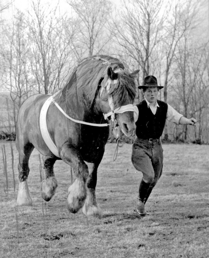 Lantbruksmötet i Varberg 5–10 juni blir framför allt ett stort tillfälle för Hallands berömda hästuppfödare att visa ardennerns förnämliga ställning i landskapet, men även maskinen i lantbruket får en stor roll. Man gör för första gången en stor parad av "bundna hästkrafter" i själva visningen.